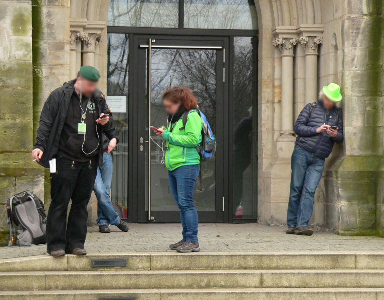 Ingress Spieler in Hannover